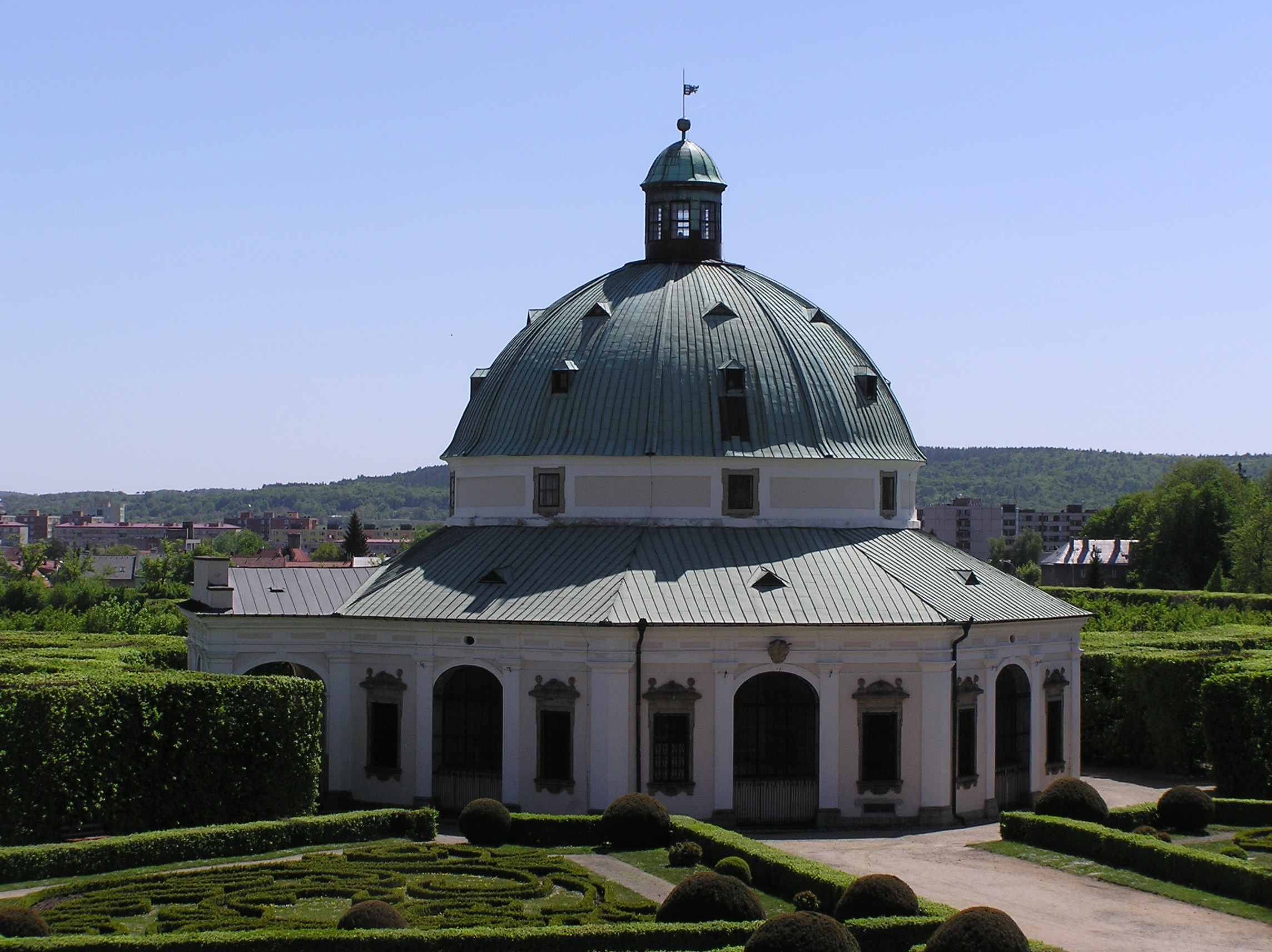 Kroměříž, 2007-04-30